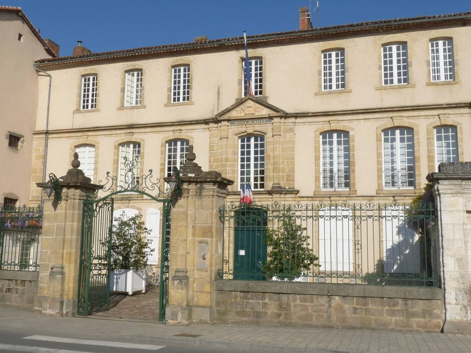 Hôtel de ville de Confolens, Charente, France